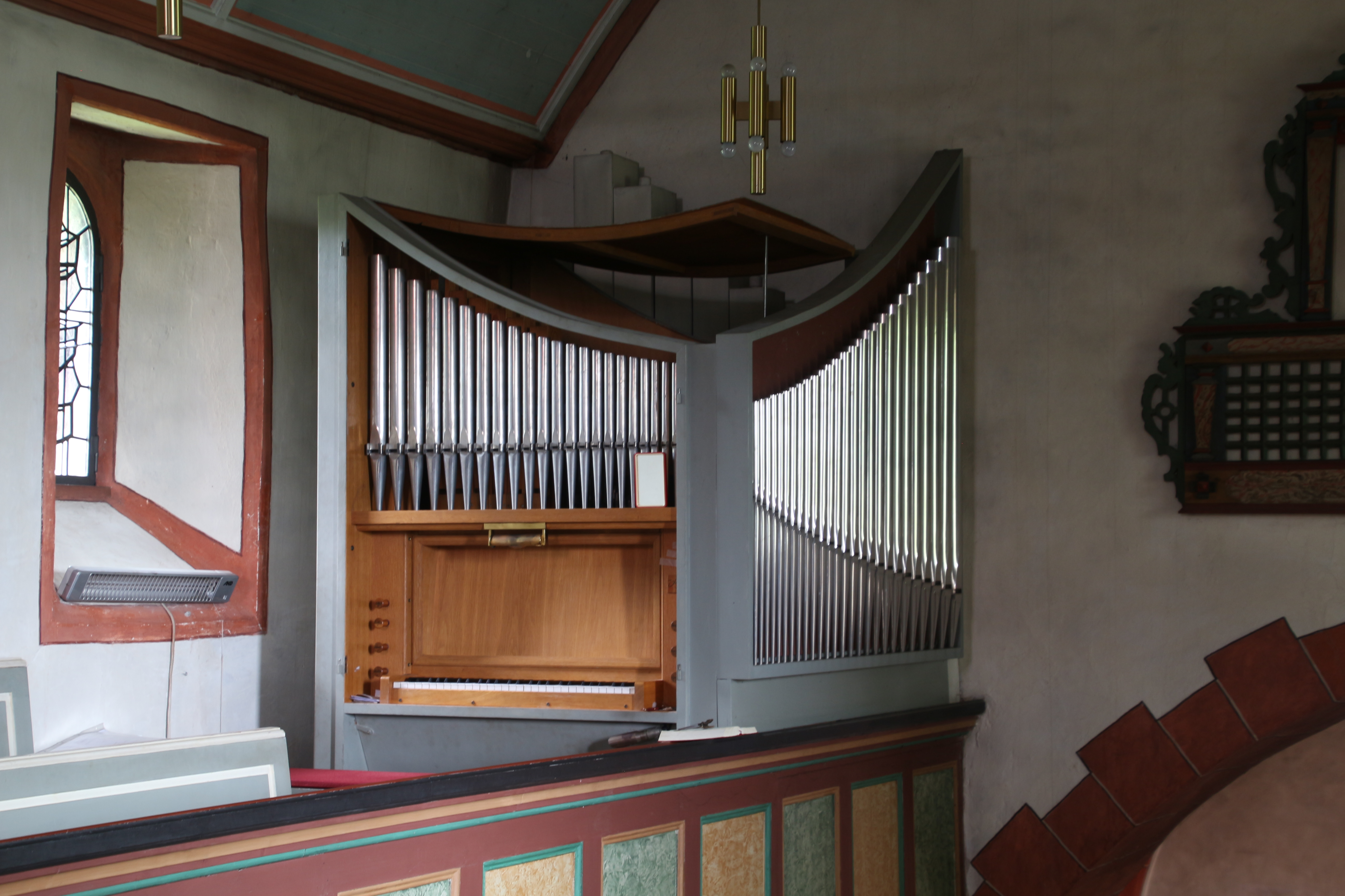 Evangelische Kirche Lixfeld, Landkreis Marburg-Biedenkopf, Hessen